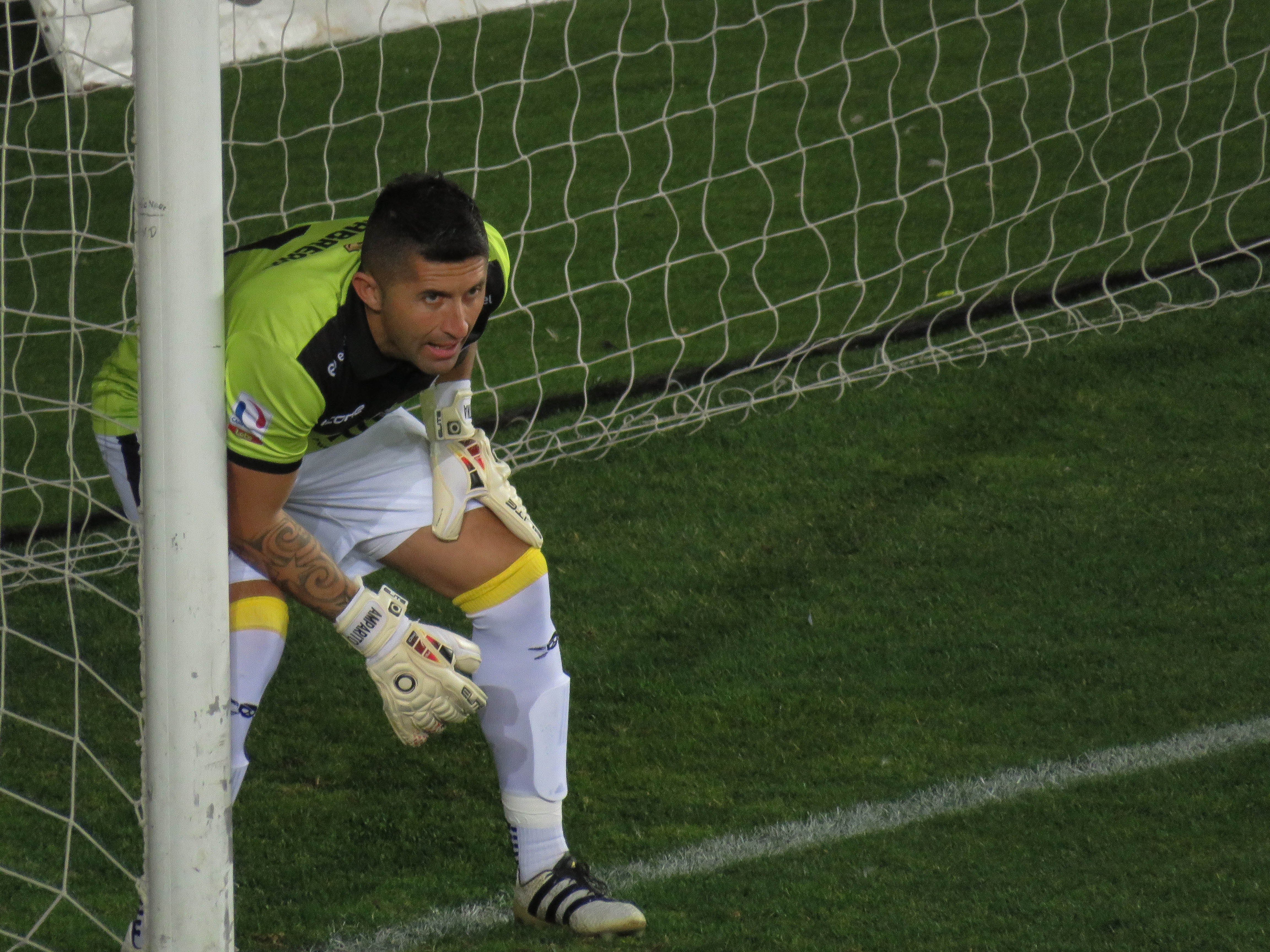 Franco Cabrera defendiendo el arco de Coquimbo en el Torneo de Transición